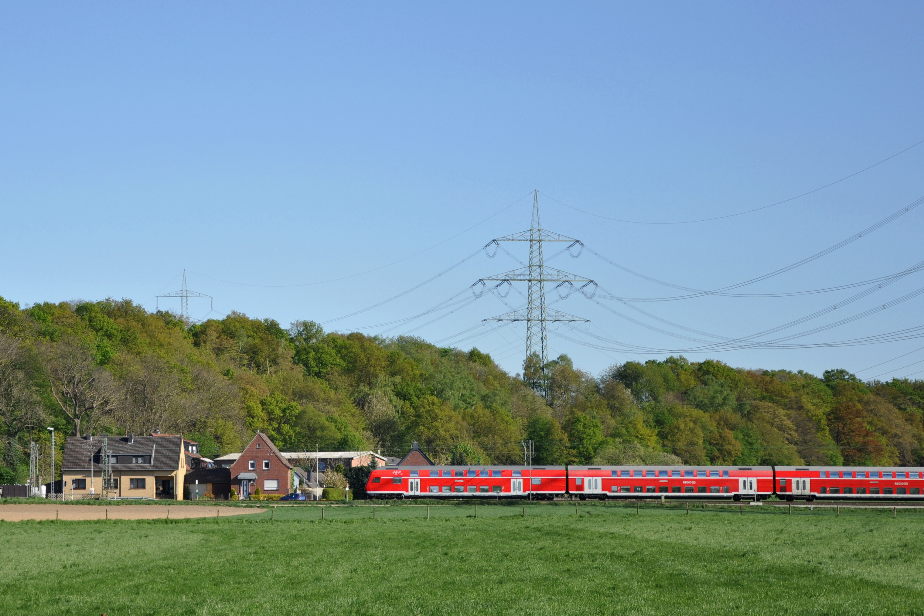 Bombardier Doppelstockwagen, DB Regio NRW, Geilenkirchen; 380/110-kV-Freileitung (Bl. 4529)